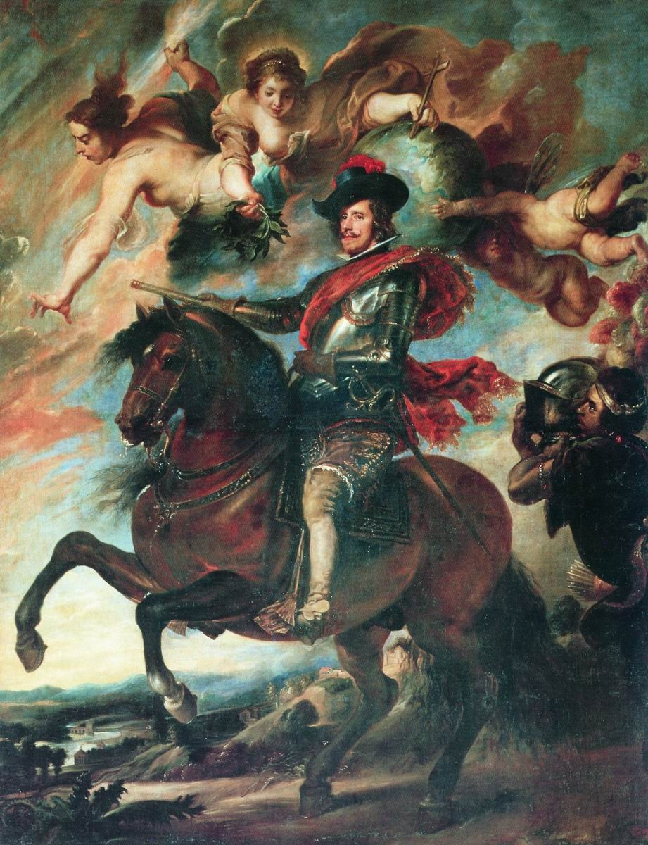 Equestrian portrait after Rubens original